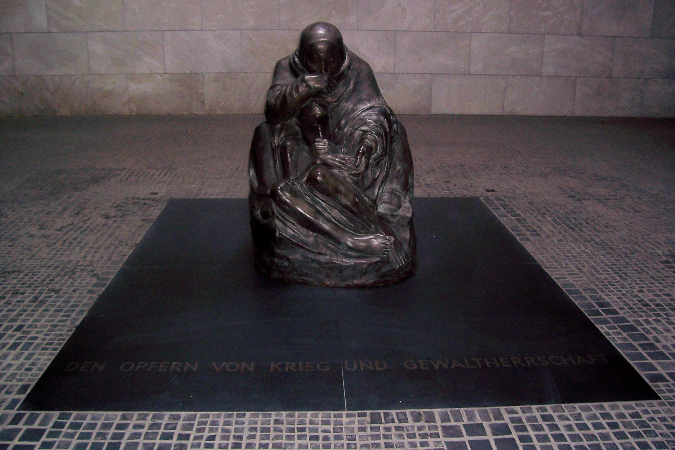 Skulptur nach Käthe Kollwitz in der Neuen Wache, Berlin